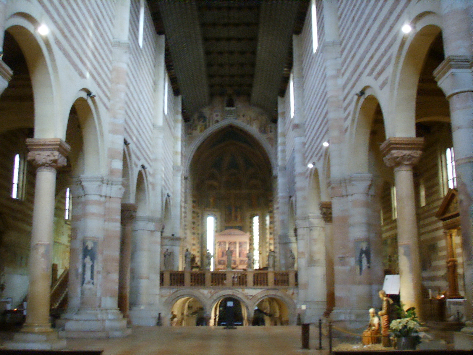 Basilica di san zeno, interno